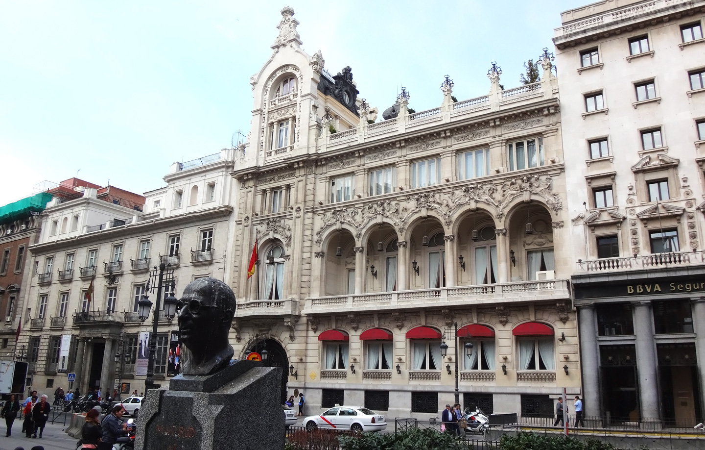 Казино Мадрида